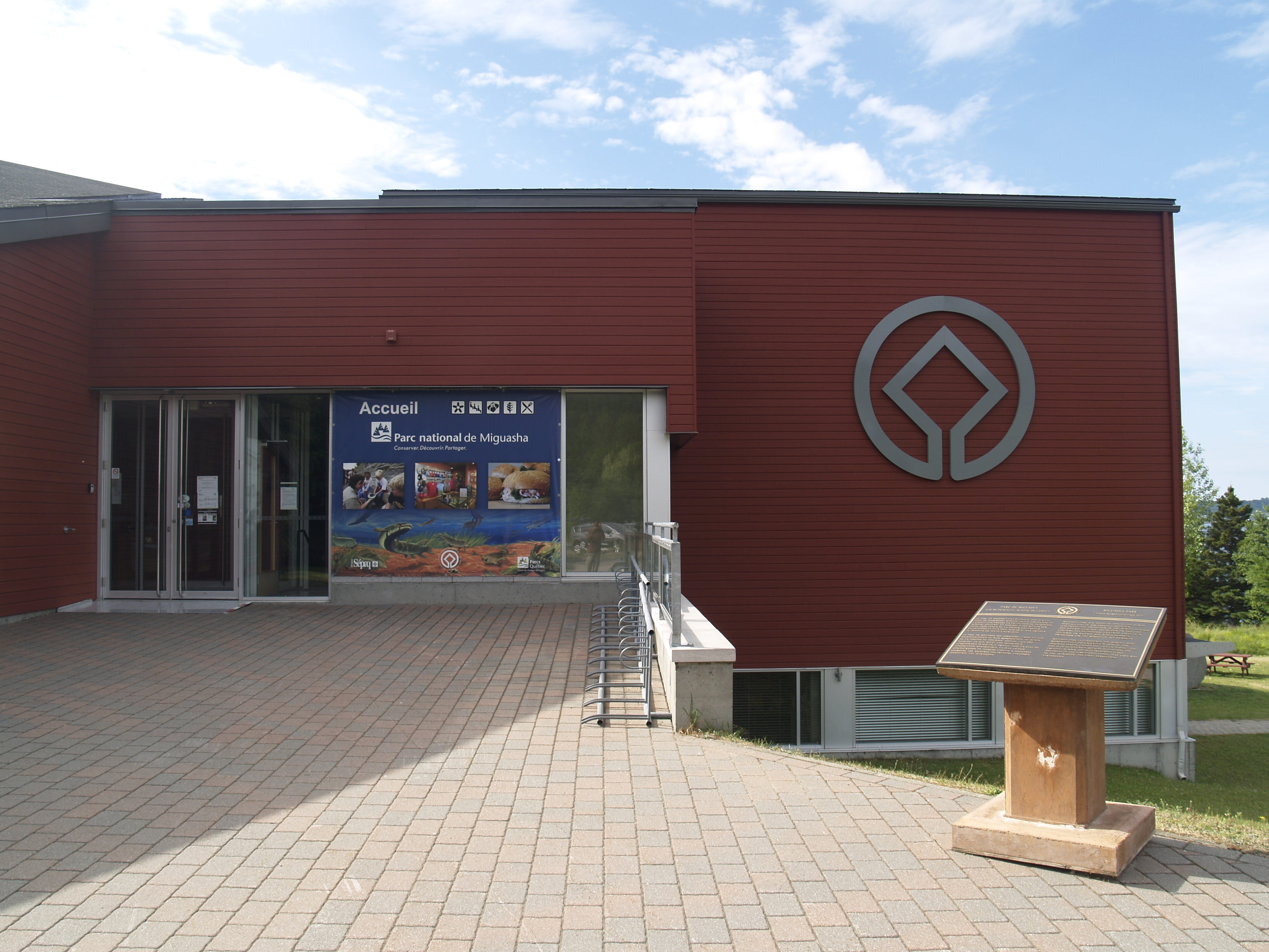 Entrada al Miguasha National Park